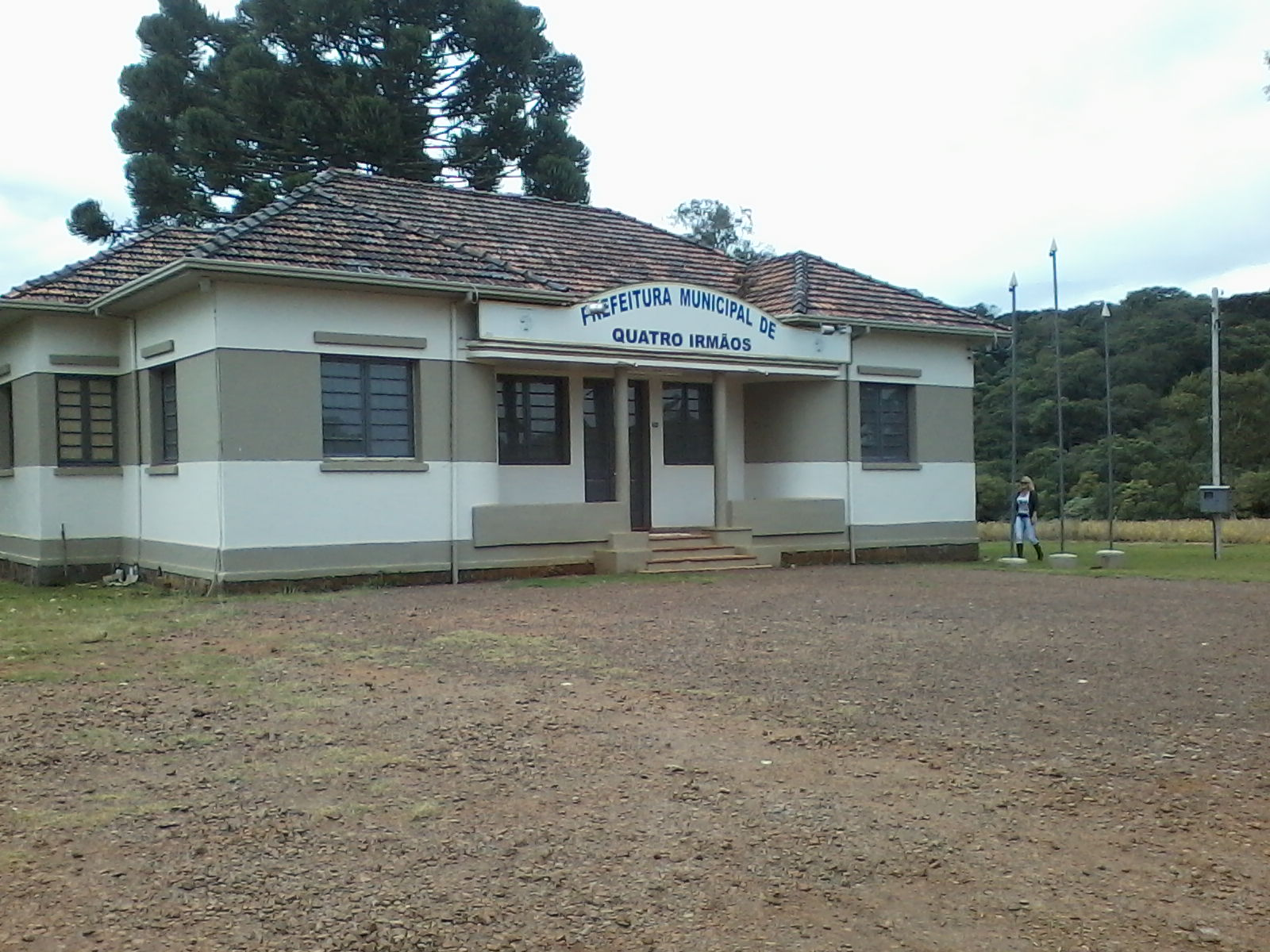 Prefeitura do município de Quatro Irmãos, Rio Grande do Sul.